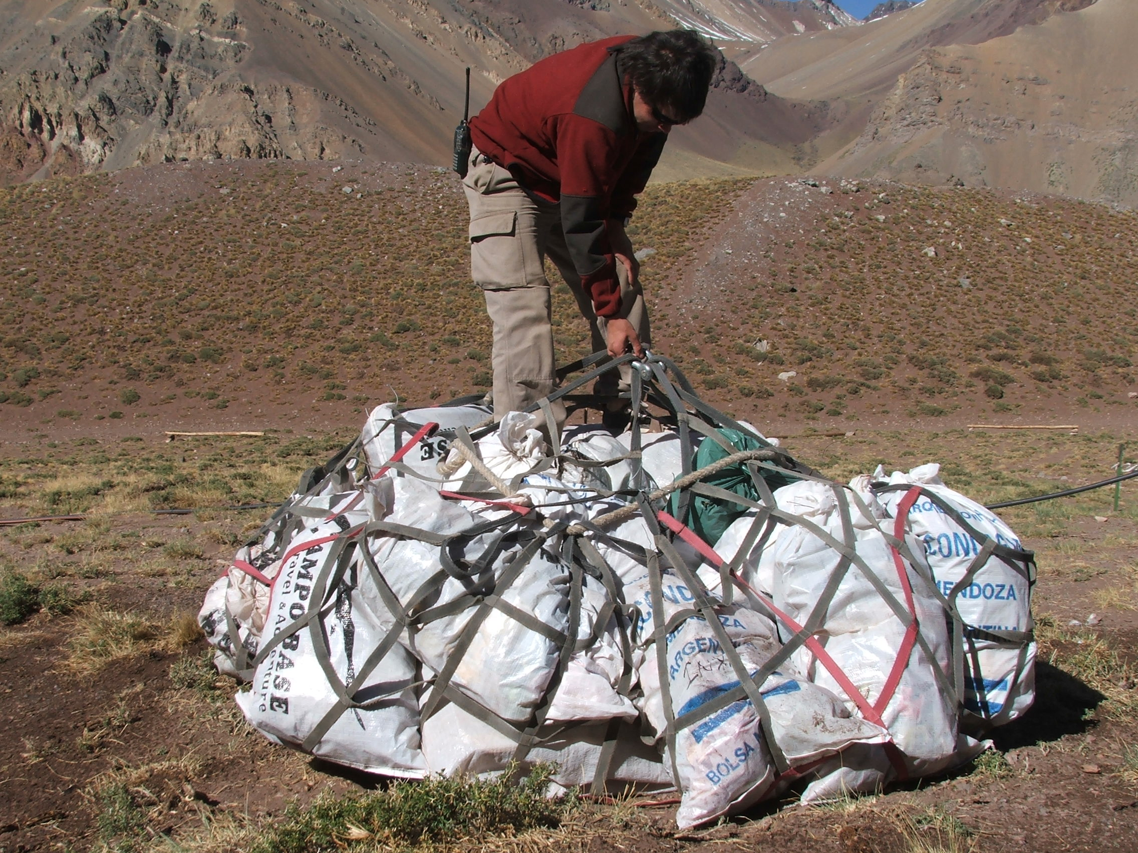 Se retira la gasura en redesde ca carga aerea mediante helicopteros.